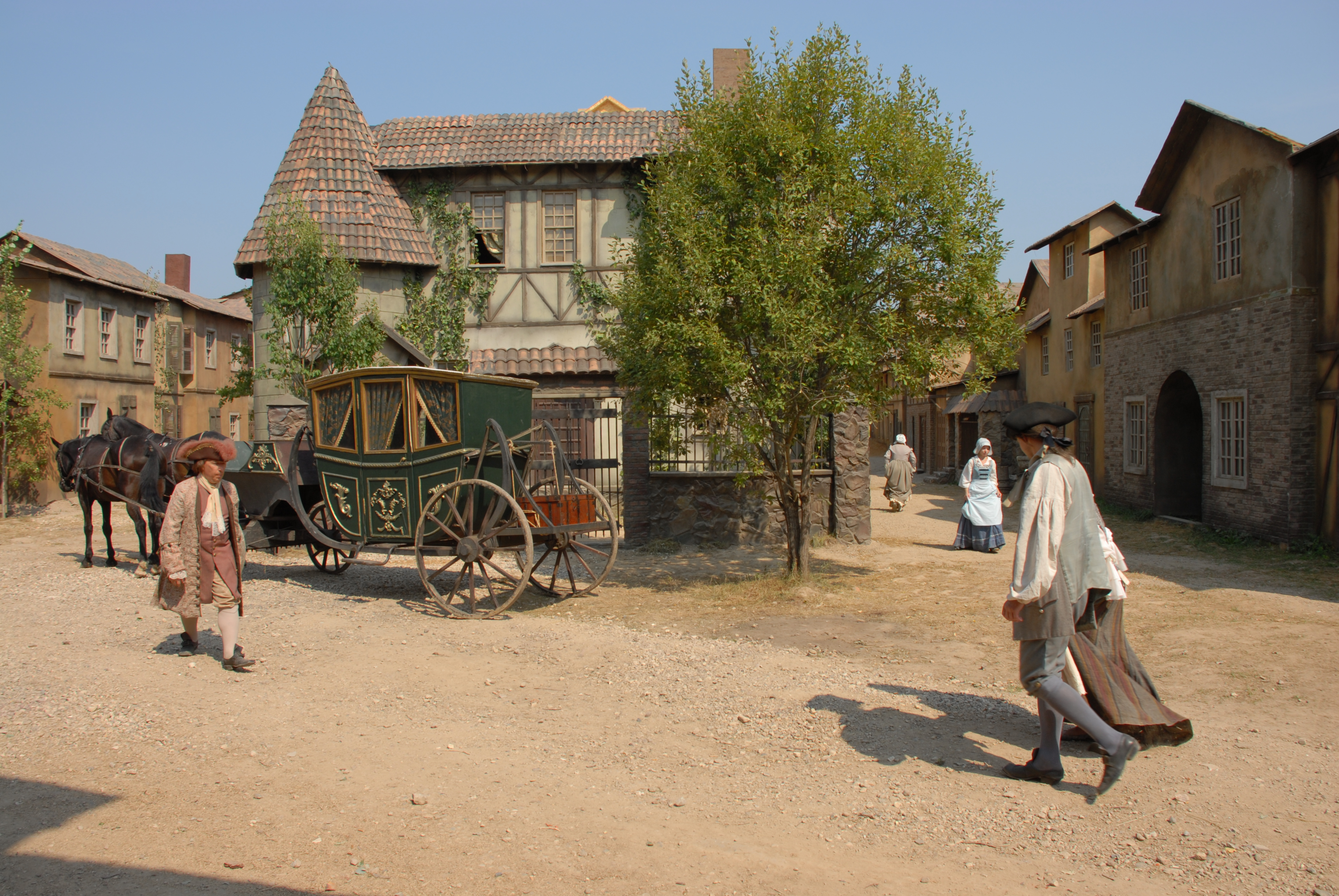 декорации фильма Записки экспедитора Тайной канцелярии